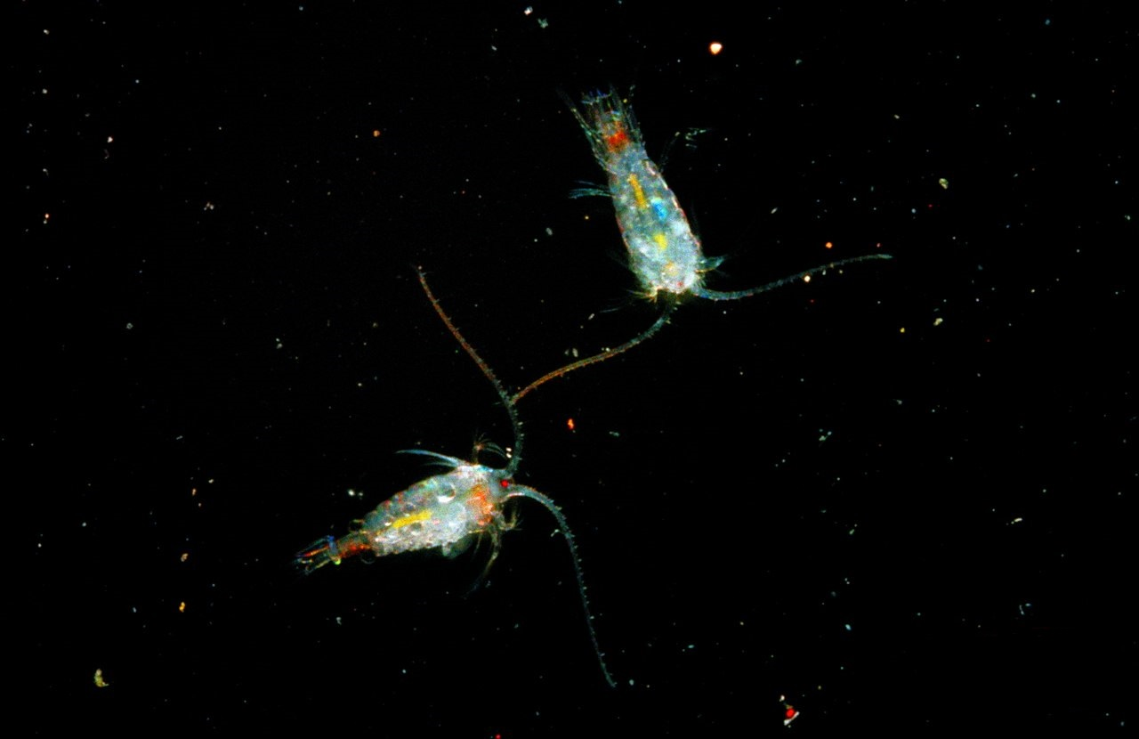 Эпишура Байкальская (Epischura baicalensis).